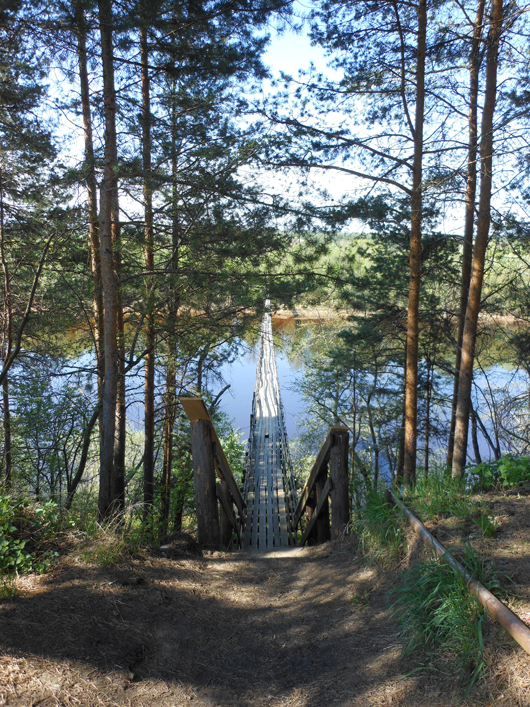 Подвесной мост из Никольска через Виледь